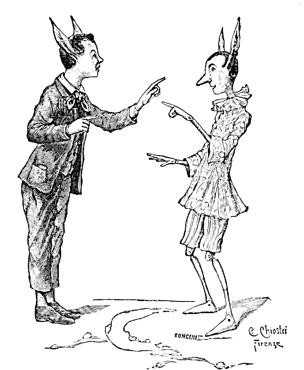 Illustrations from "Le avventure di Pinocchio, storia di un burattino", Carlo Collodi, Bemporad & figlio, Firenze 1902 (Drawings and engravings by Carlo Chiostri, and A. Bongini)